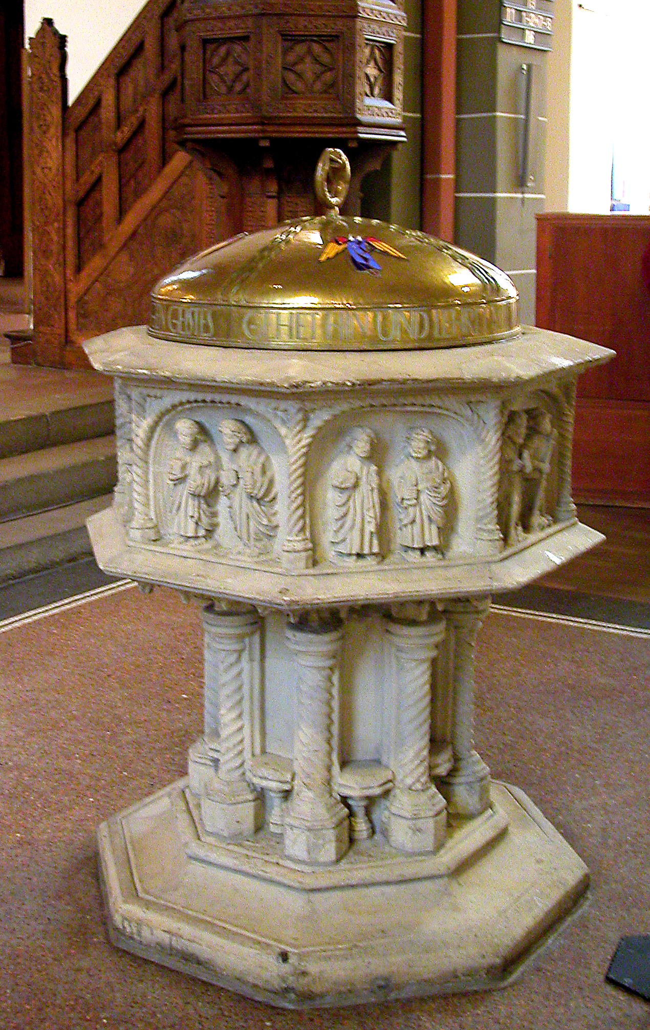 Taufstein. Stadtkirche St. Georg. Luenen (de); Купель в евенгелической церкви св. Георга. Люнен (ru).